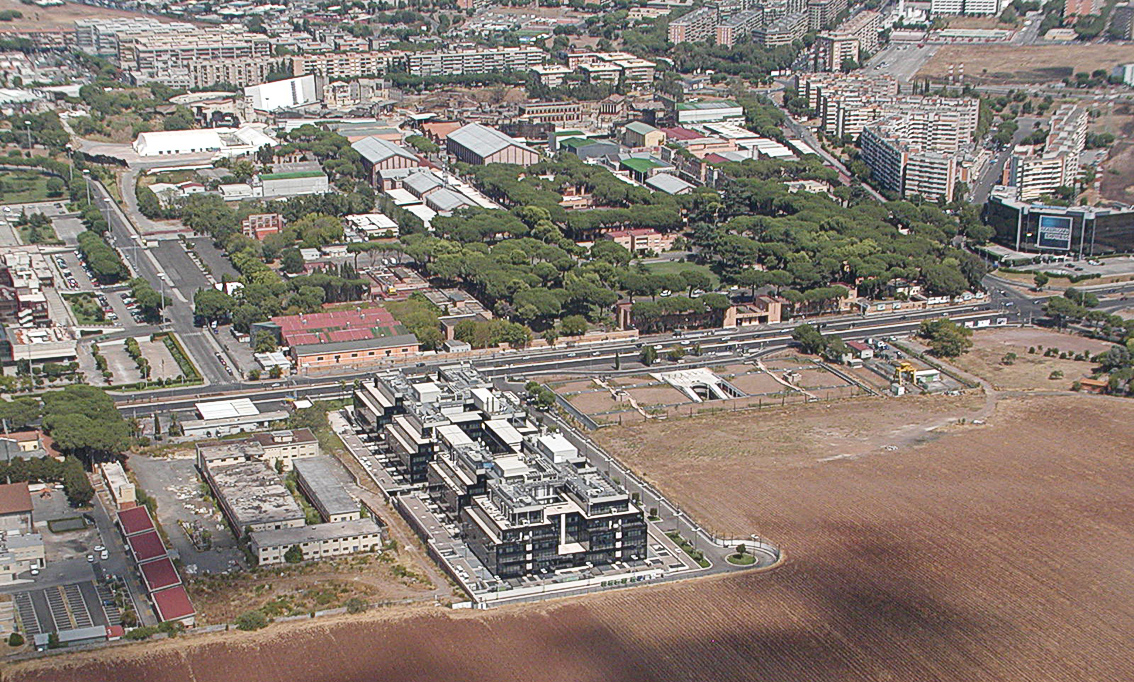 Cinecittà, Roma